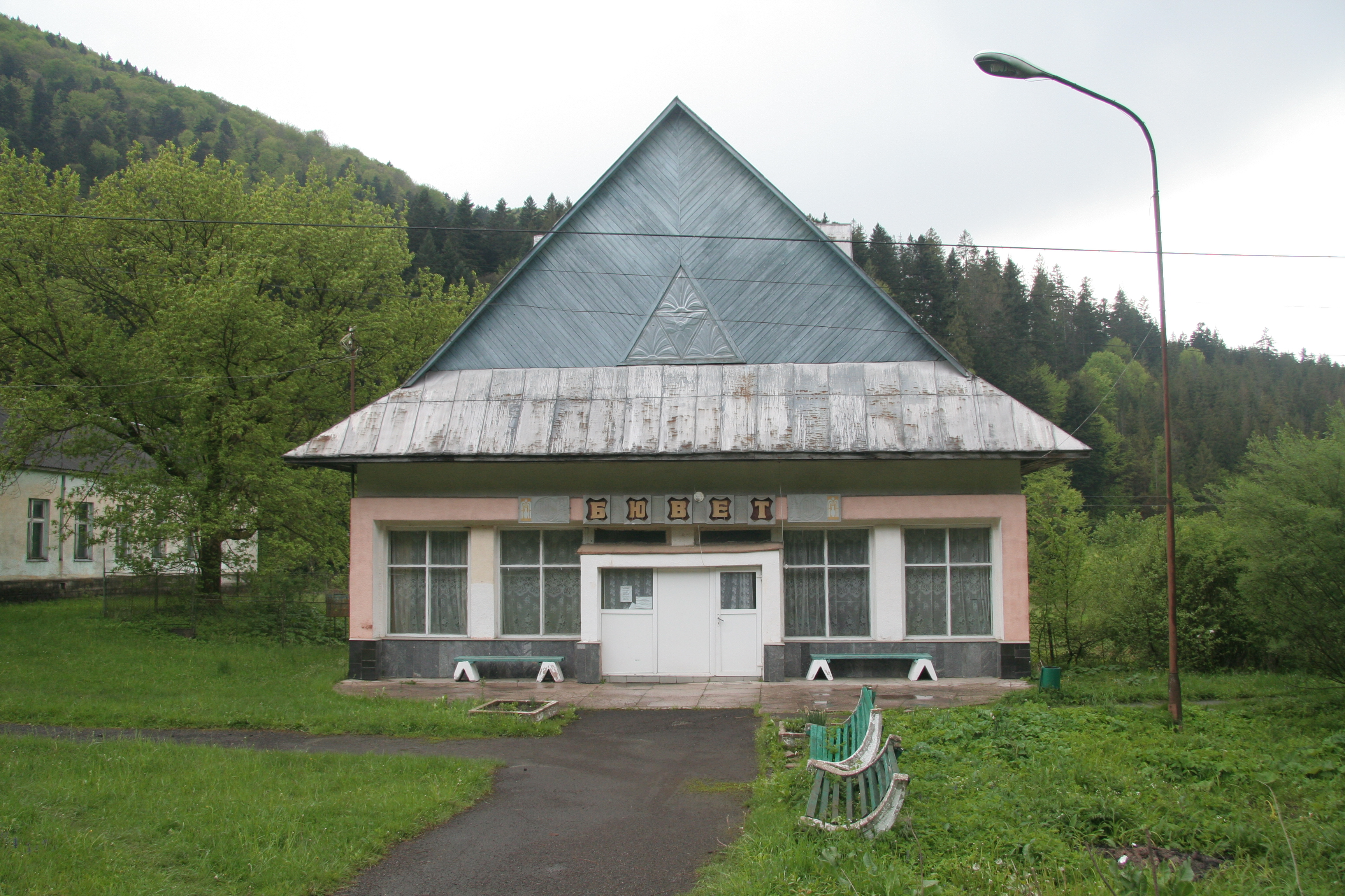 будинок над скважиною з водою